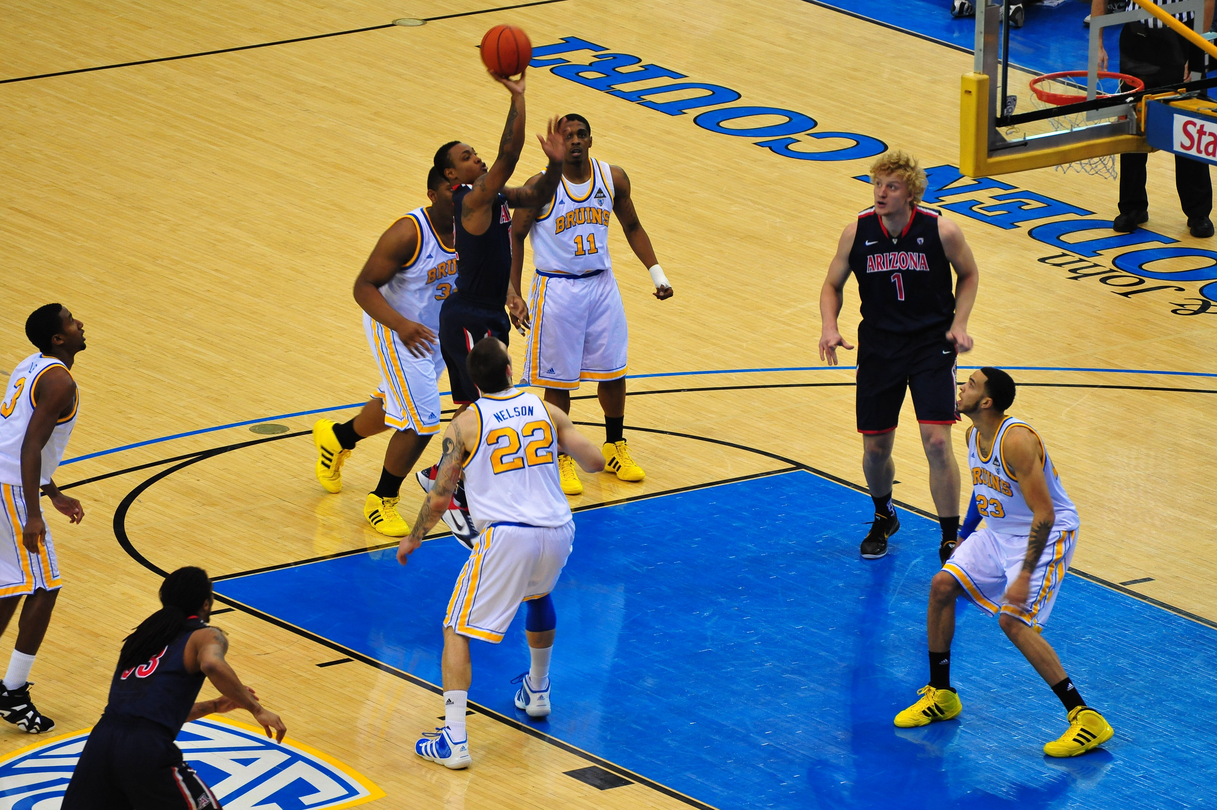 Arizona vs UCLA